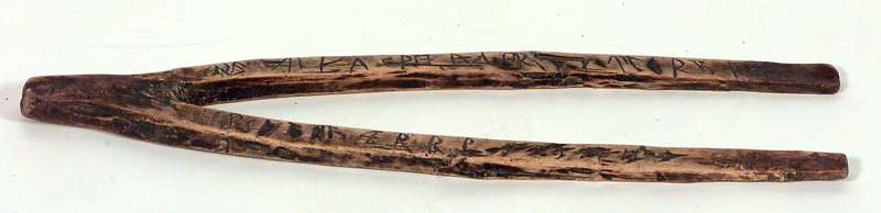 Ostekløft fra Tynset i Hedmark.Lengde 50 cm. Foto Norsk Folkemuseum, NFL.15924.